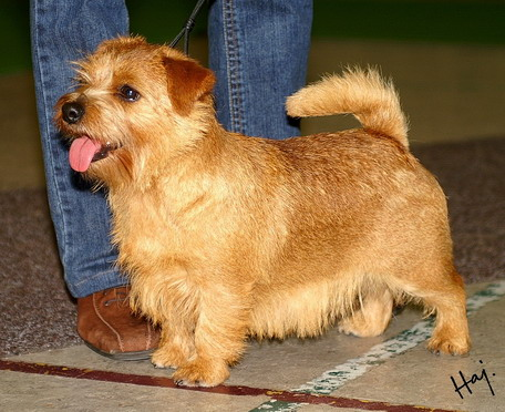 Norfolk terriër. Clubkampioen NTCN 2006